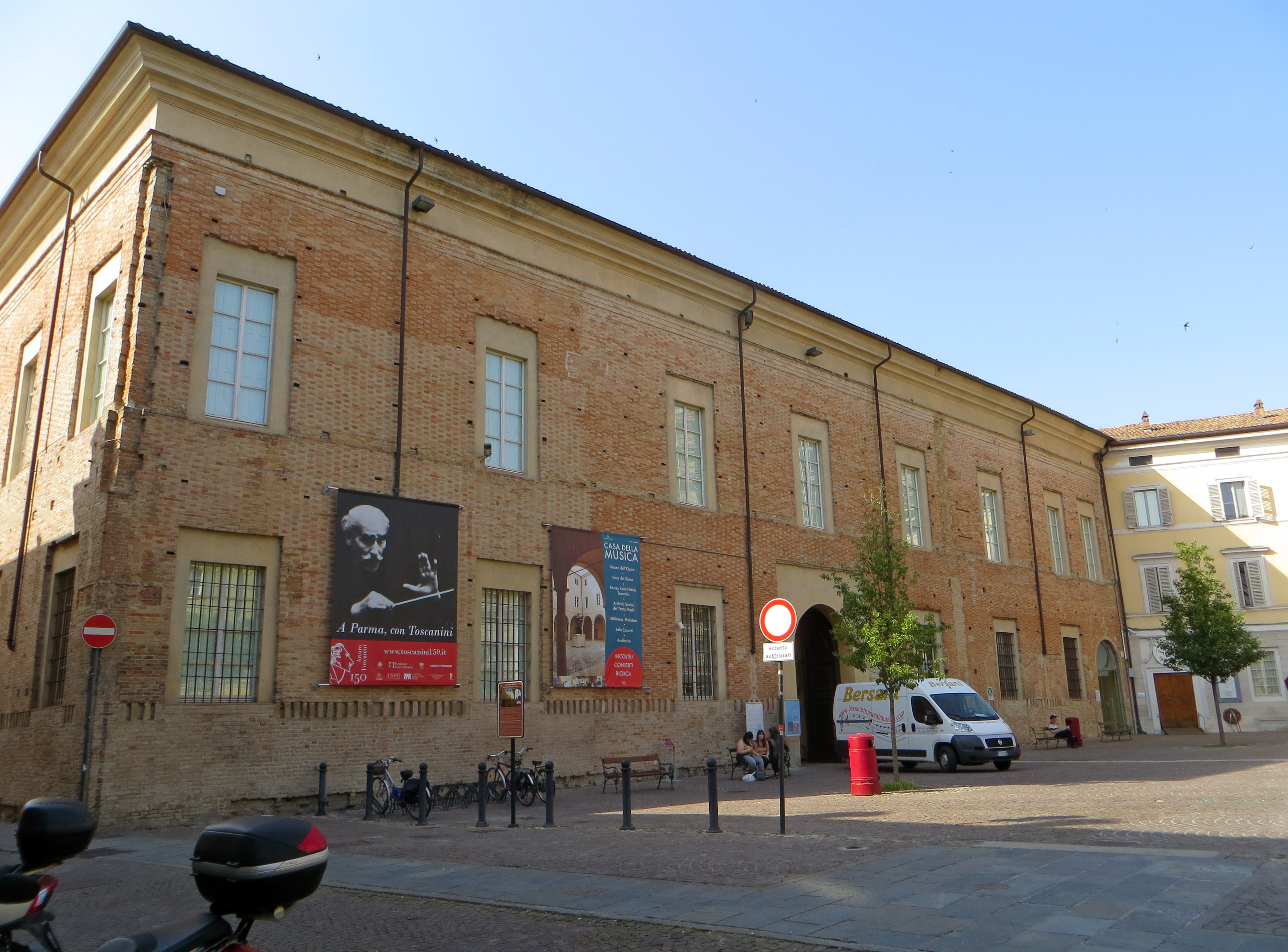 Palazzo Cusani (Parma) - facciata